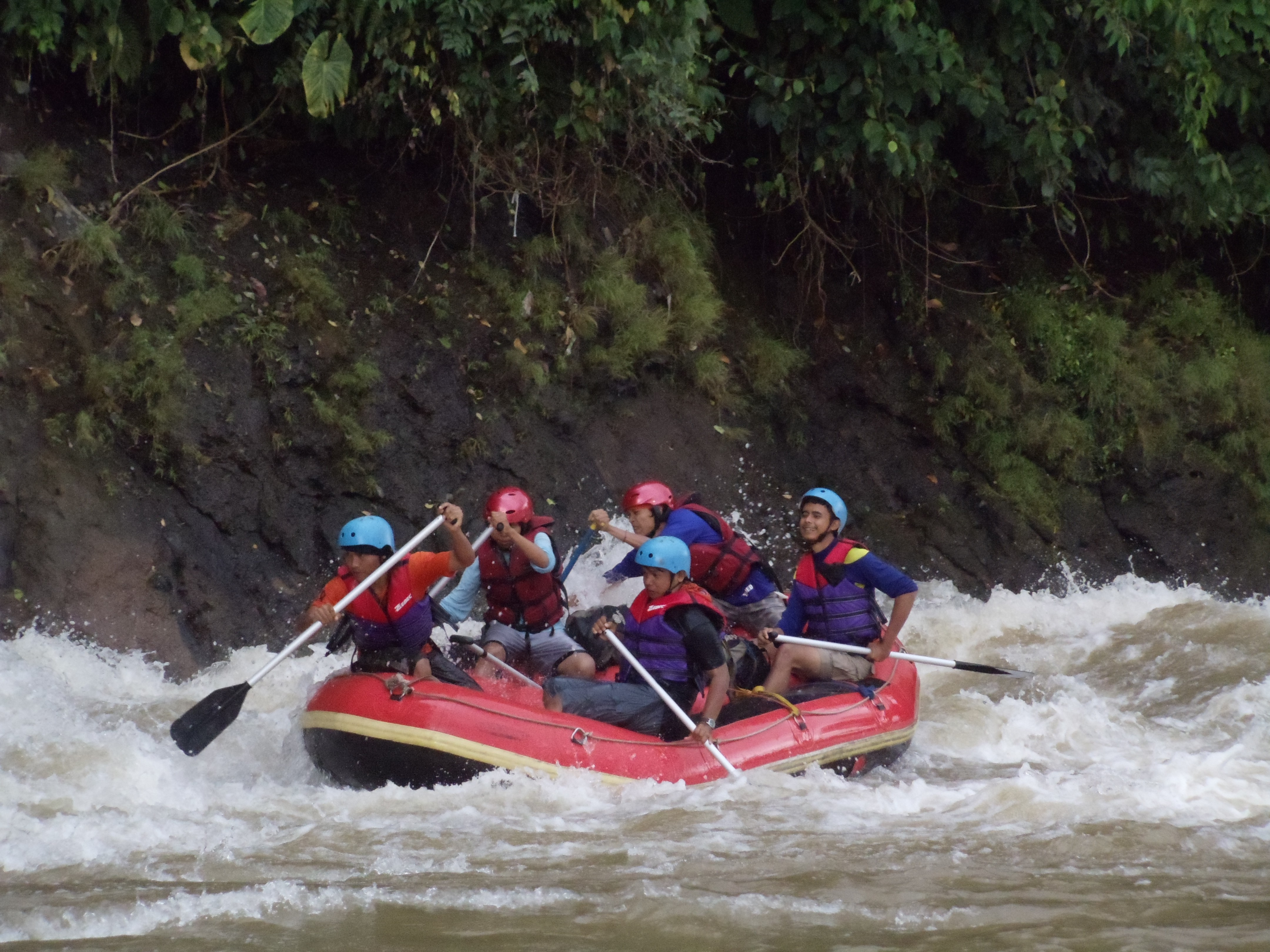 arung jeram sungai srayu banjarnegara 2011